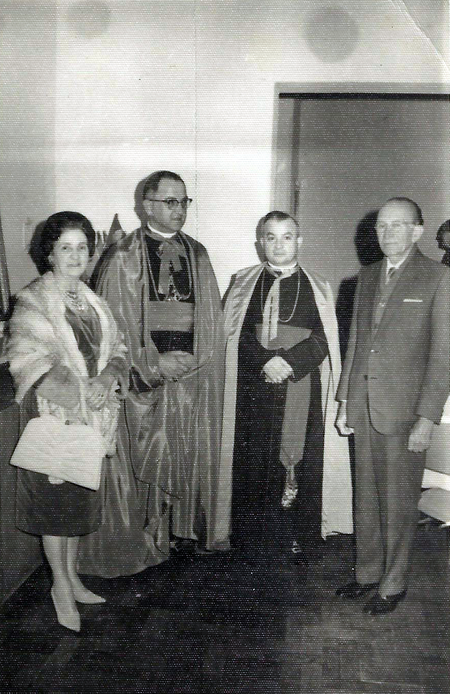 Adelia Paternoster Costamilan e José Costamilan ladeando o bispo Luiz Victor Sartori (à esquerda) e outro prelado em visita a Passo Fundo nos anos 60